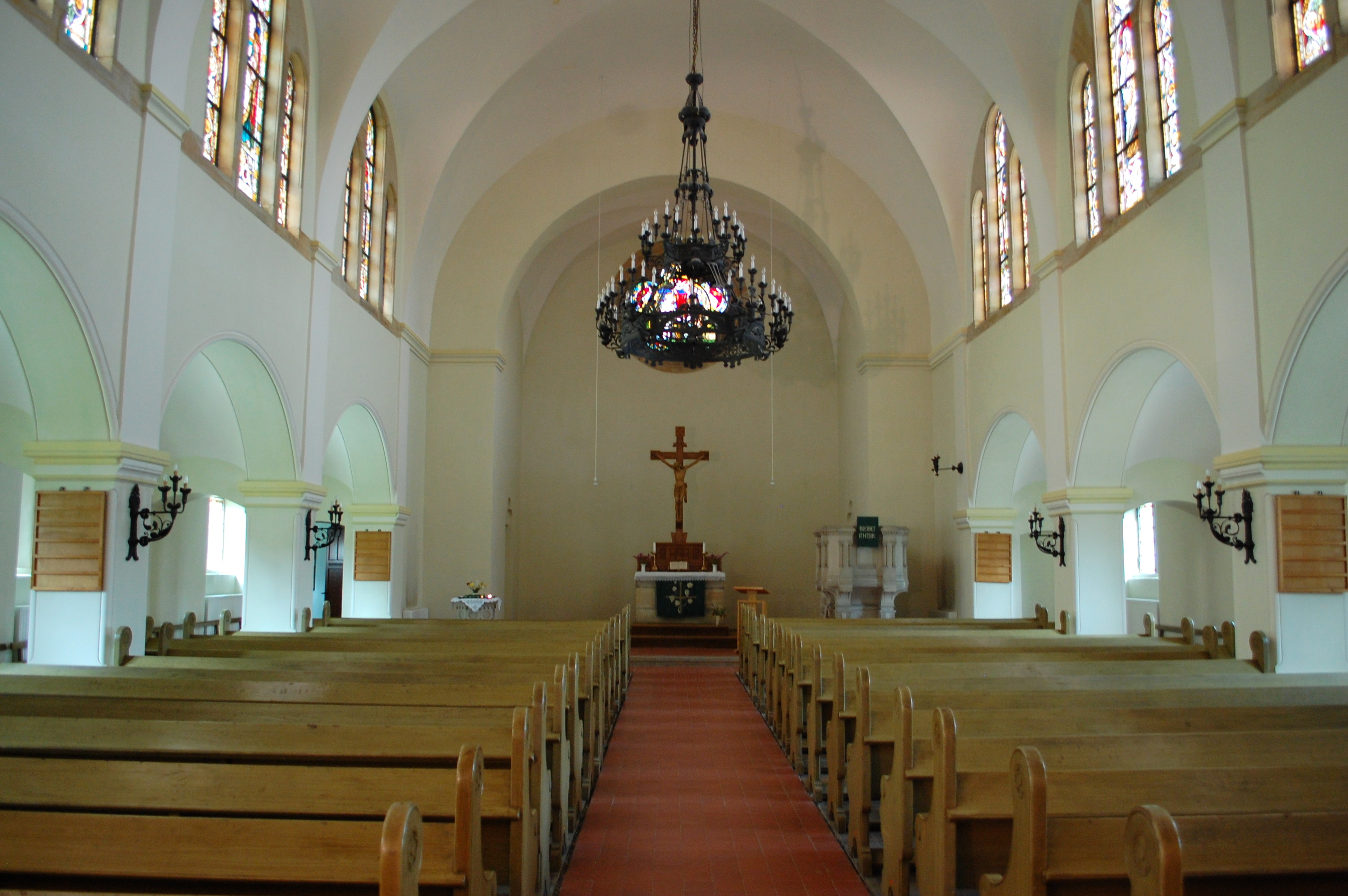 Sankt-Johannis-Kirche (Quedlinburg), Kirchenschiff